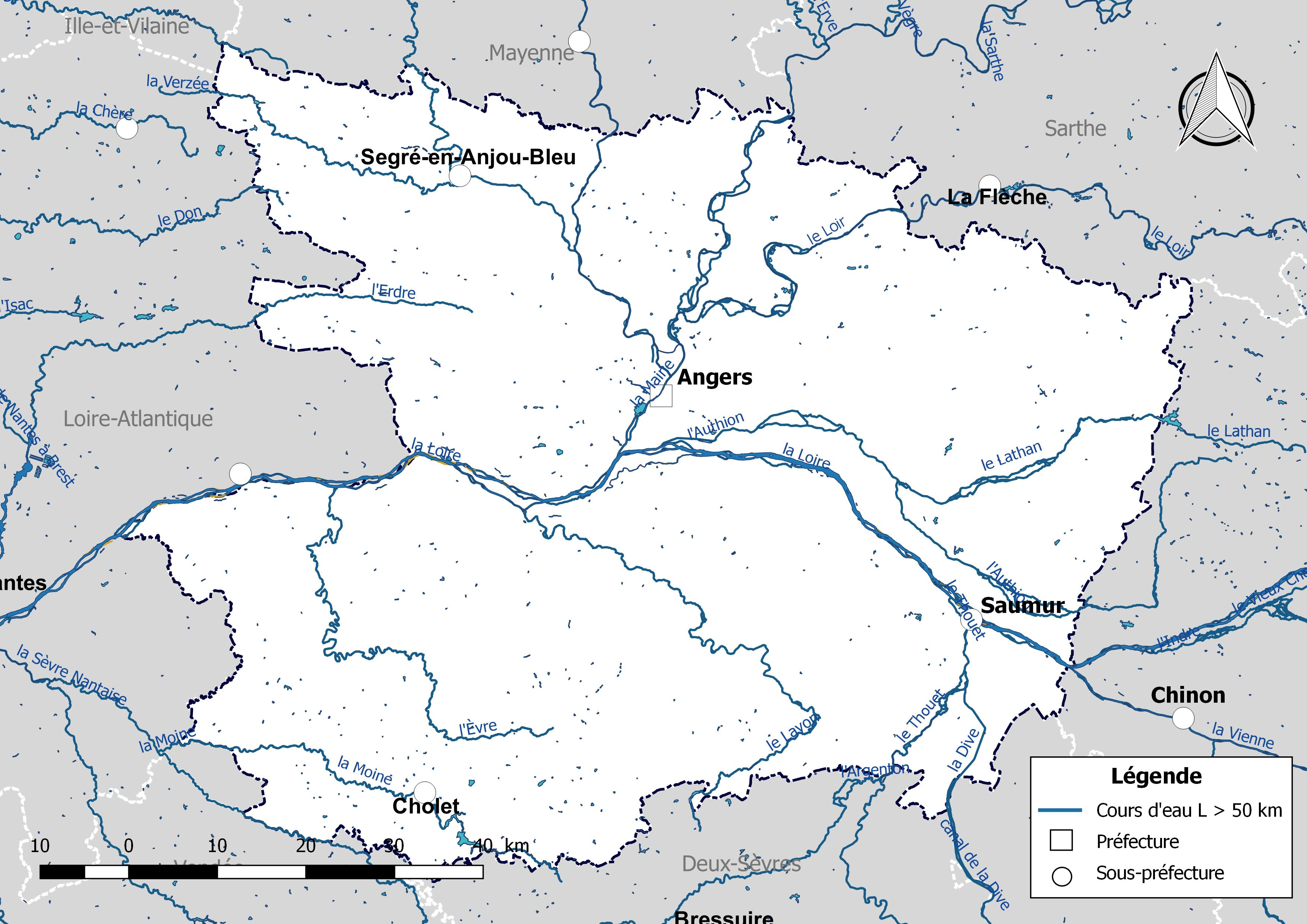 Carte des cours d'eau de longueur supérieure à 50 km drainant le département de Maine-et-Loire (France).